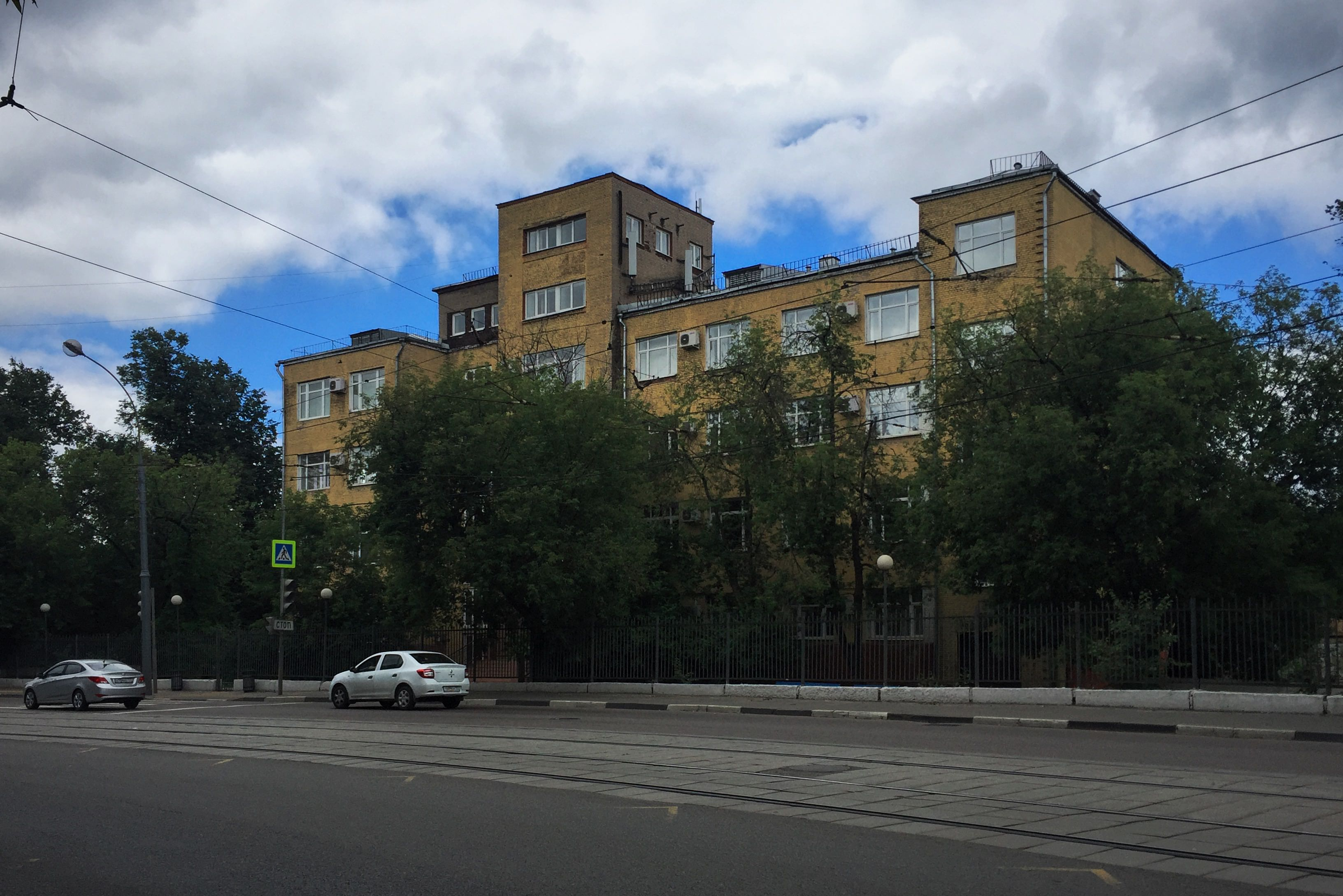 Ростокинский проезд, 13. Московский государственный лингвистический университет. Здание построено в 1934 для Института философии, литературы и истории (ИФЛИ)